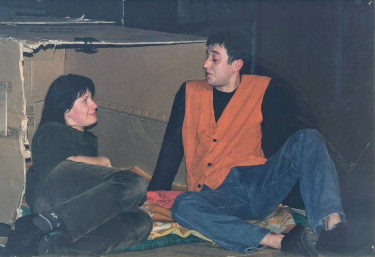 Спектакль Театра.DOC "Война молдаван за картонную коробку". Фестиваль "Майские чтения", театральный центр "Голосова 20", Тольятти. Россия.